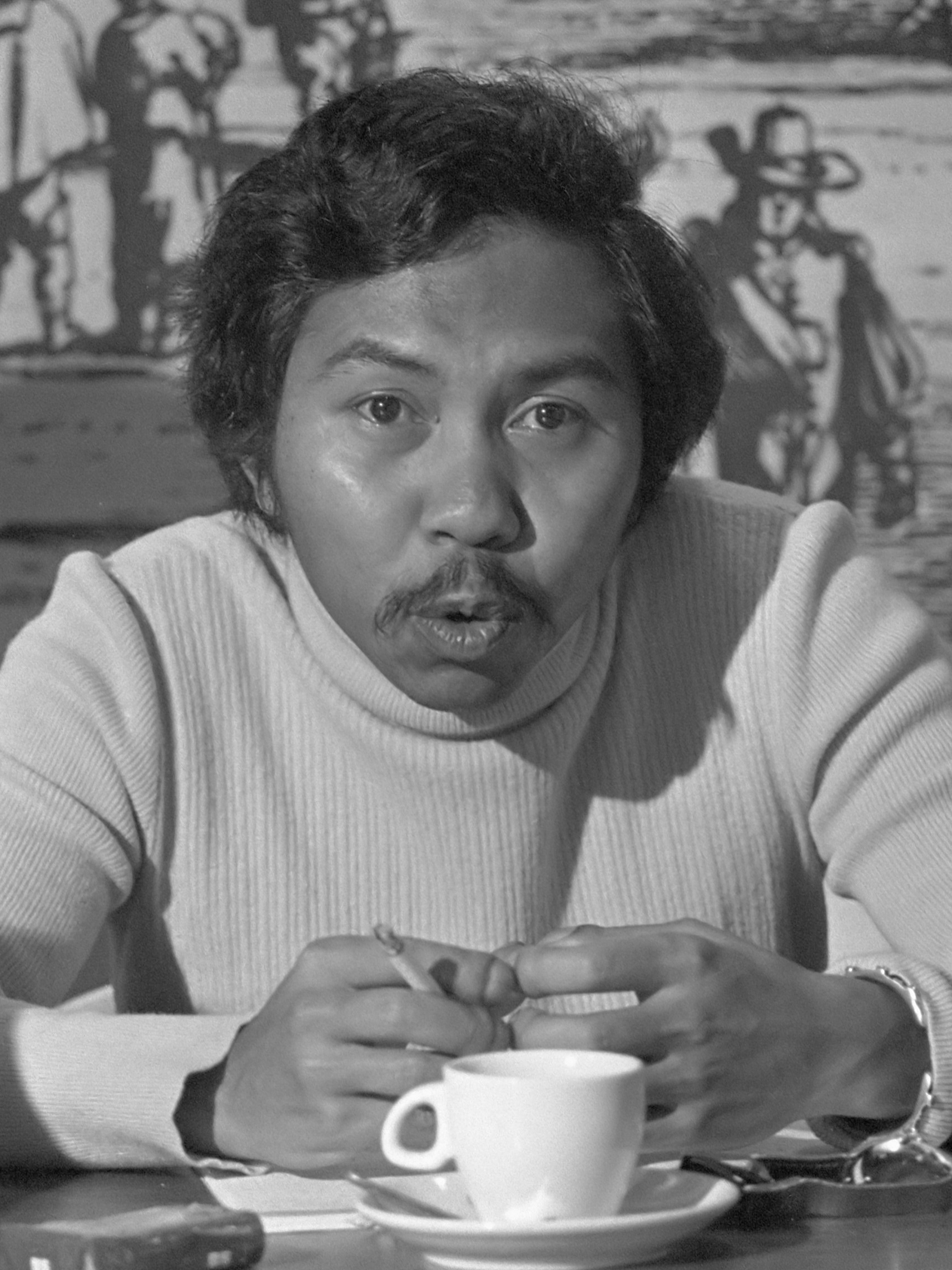 Heer Abilio Araujo vertegenwoordiger Fretilin Oost-Timor tijdens persconferentie Nieuwspoort 21 oktober 1975